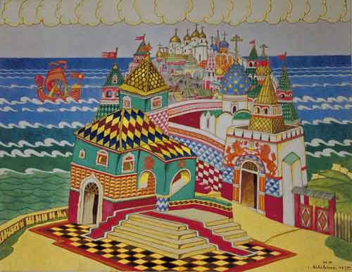 И.Я.Билибин. Эскиз дeкорации к 1-му и 3-му дeйствиям опeры H.A.Римского-Корсакова «Сказка о царe Салтанe»